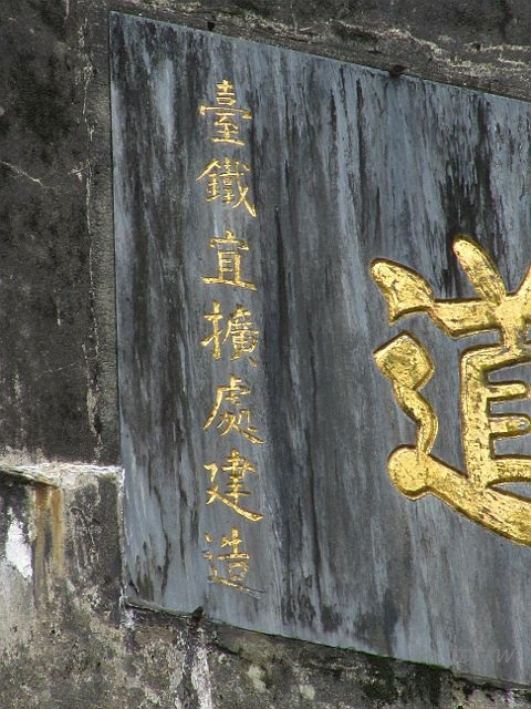 宜蘭線鐵路示德隧道匾額落款 was filmed by TDCKW on 20100515